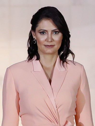 (Brasília - DF, 13/11/2019) Presidente da República, Jair Bolsonaro acompanhado da Primeira Dama, Michelle Bolsonaro recebem o Primeiro-Ministro da República da Índia, Narendra Modi. Foto: Alan Santos/PR